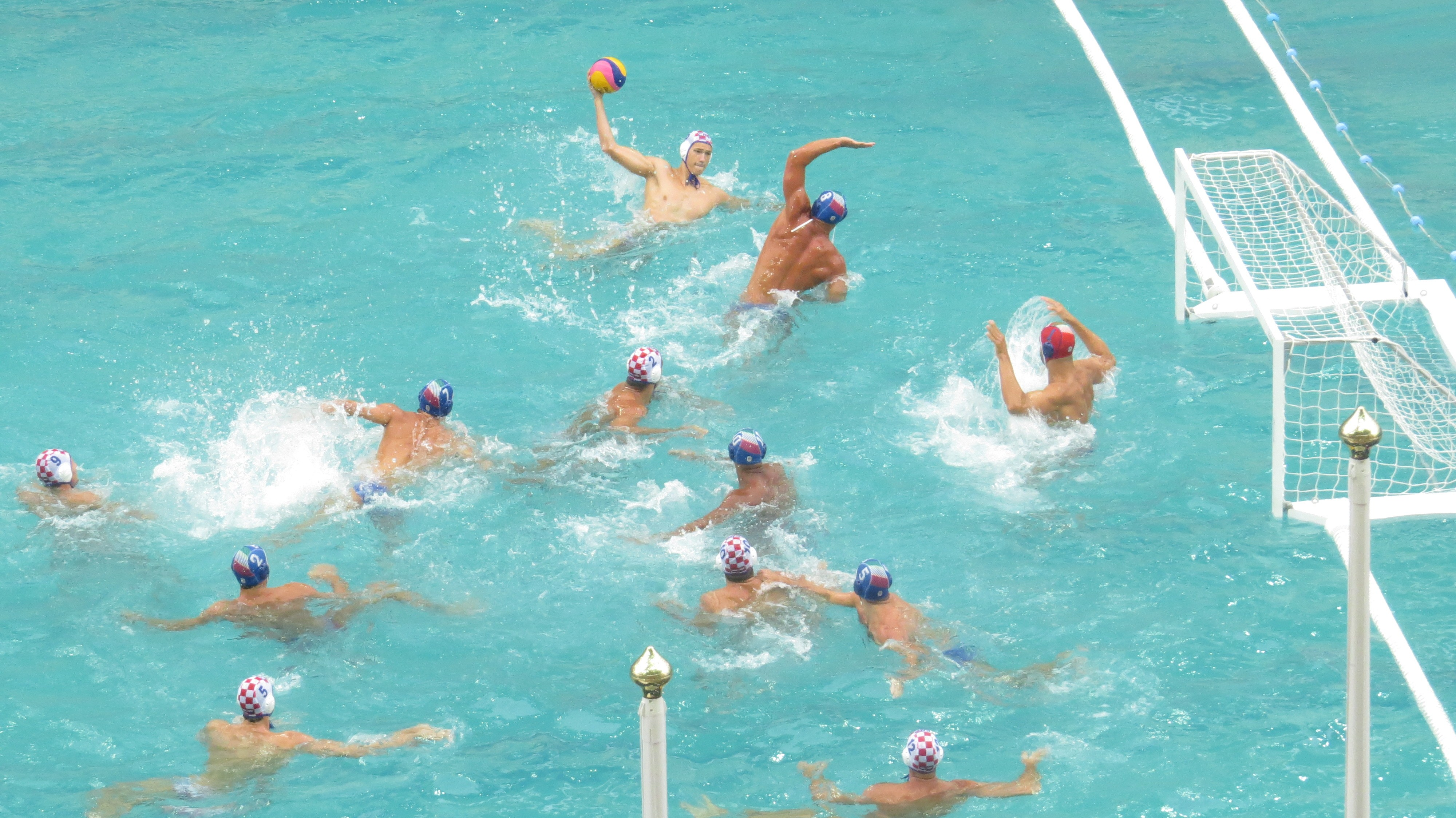 Rio 2016. Polo aquatico. sx50 145